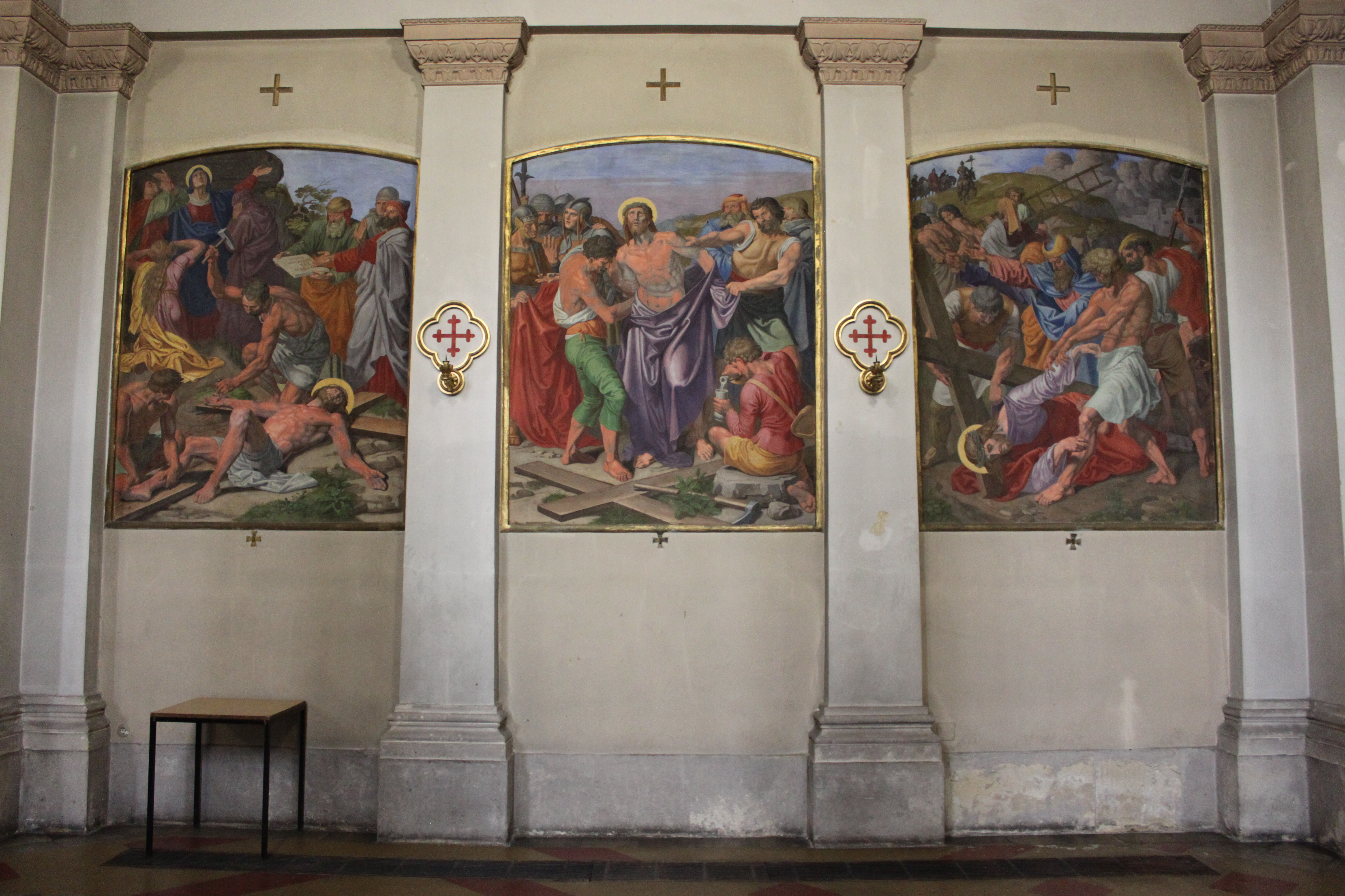 Kath. Pfarrkirche, hl Johannes Nepomuk, Kreuzweg von Joseph von Führich (1844-1846), Drei-Bilder-Kombination